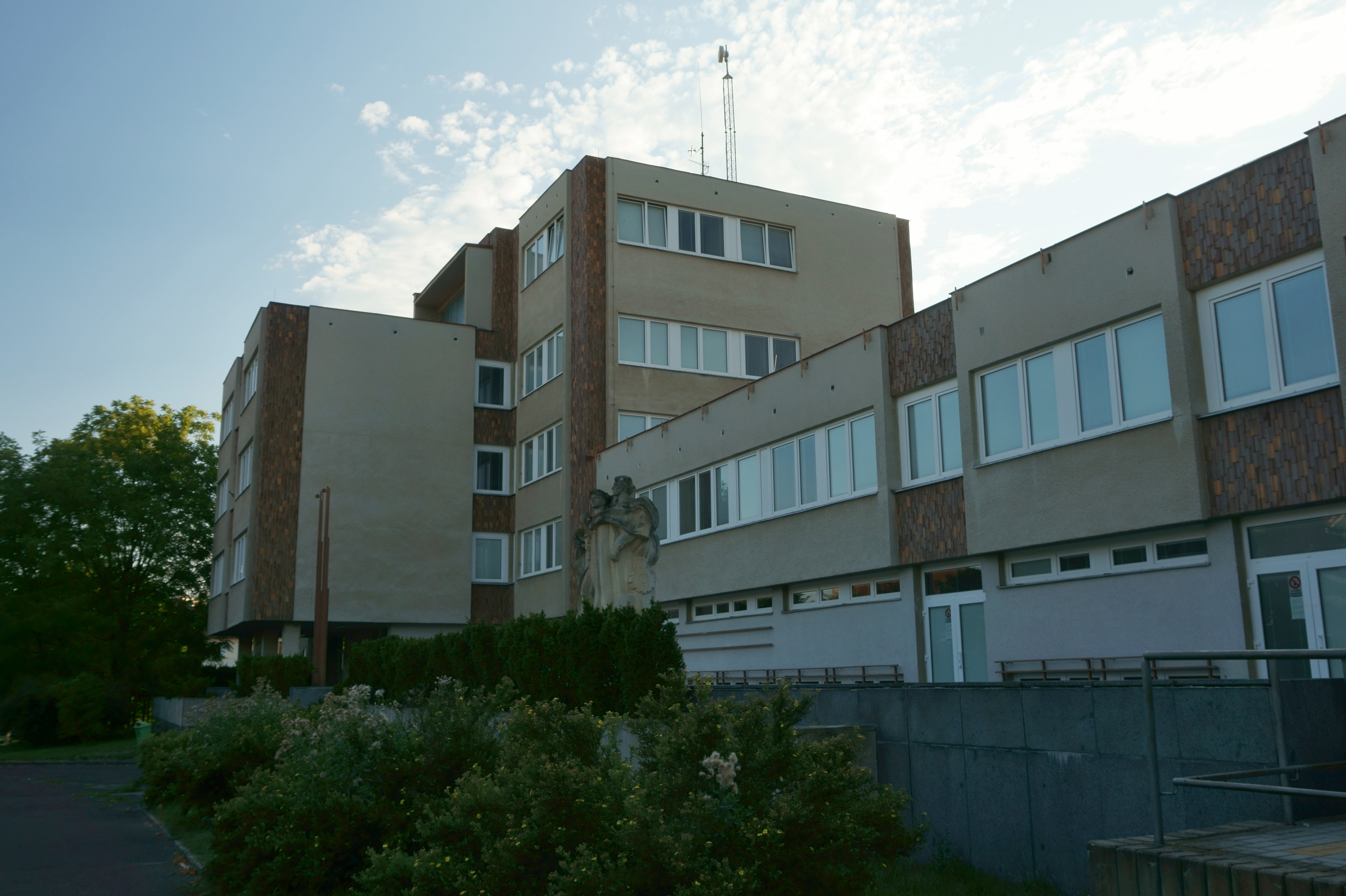 Cheb - Fakulta ekonomická ZČU